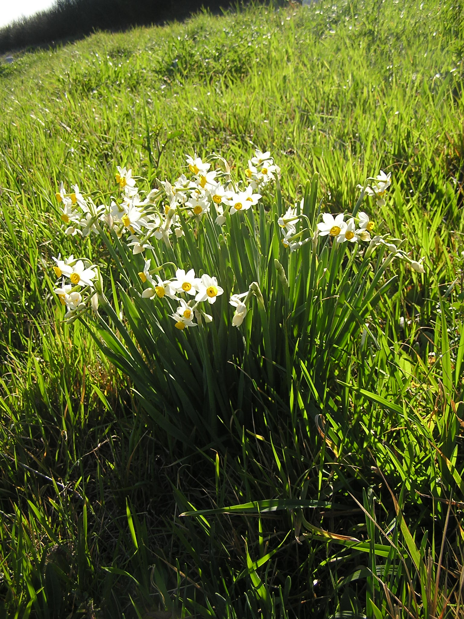 L'immagine è stata scattata all'inizio del mese di marzo nel Parco del Cardeto, al centro di Ancona. Rappresenta la fioritura di narcisi tazzetta (Narcissus tazetta) al Campo degli Ebrei, lo storico cimitero israelitico la cui storia inizia nel XV secolo.